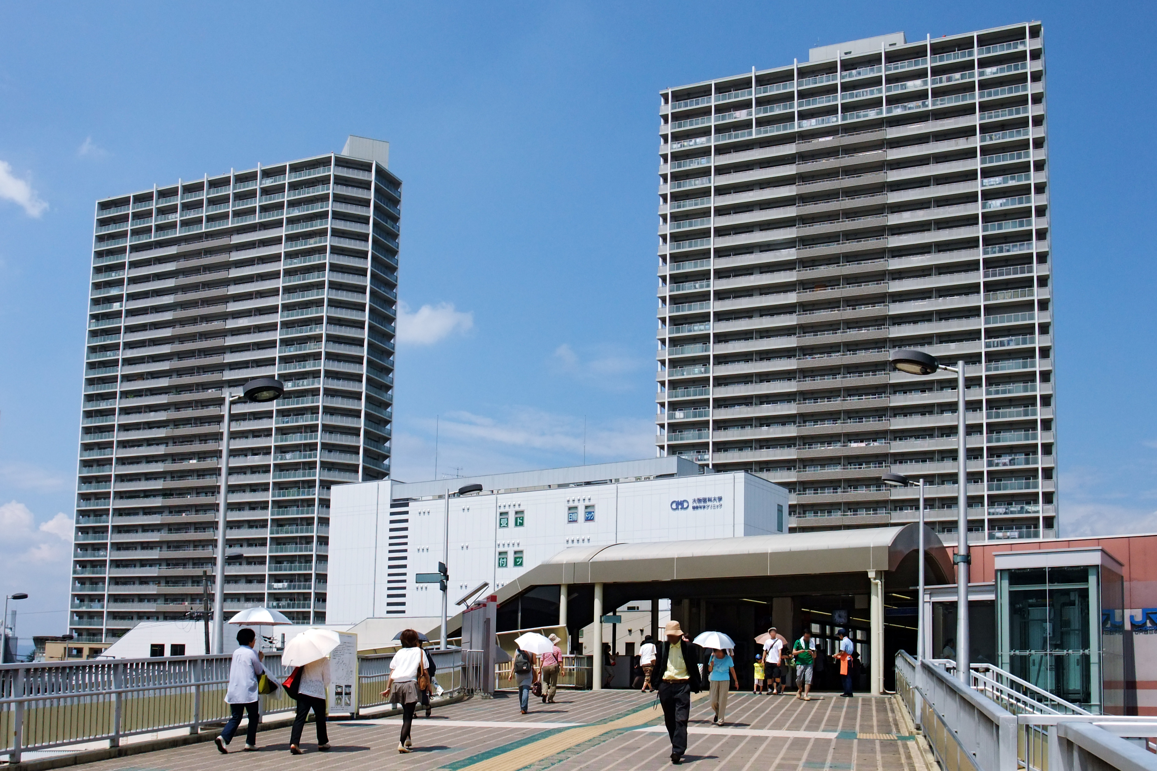 Takatsuki Station in Takatsuki, Osaka prefecture, Japan